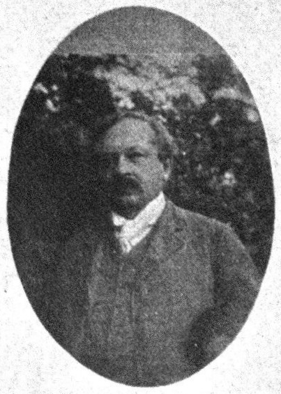 Österreichischer Politiker, Reichsratswahl 1907, Name siehe Dateiname